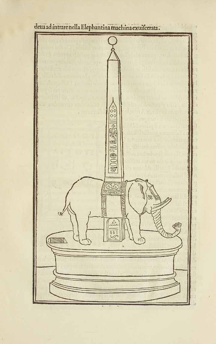 Elefantenobelisk. Holzschnitt, in: Francesco Colonna: Hypnerotomachia Poliphili, Vbi Hvmana Omnia Non Nisi Somnivm Esse Docet. Atqve Obiter Plvrima Scitv Saneqvam Digna Commemorat